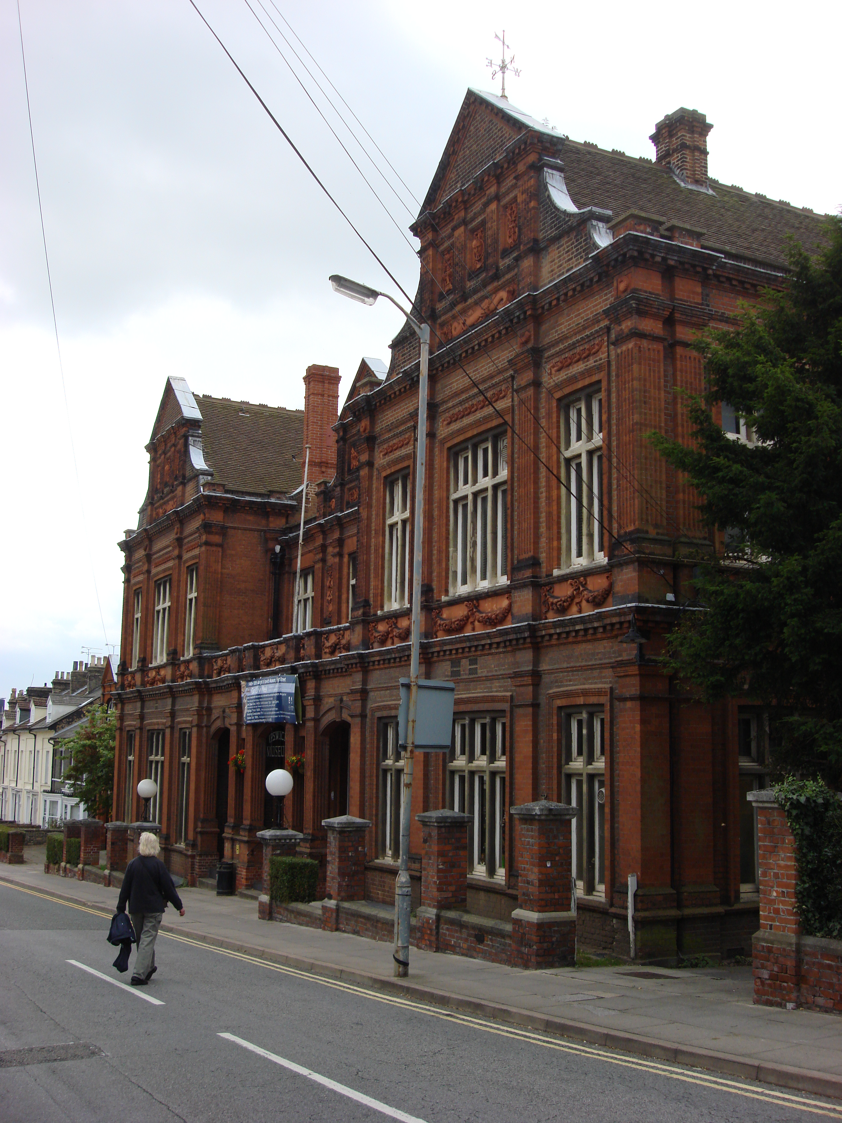 Ipswich Museum